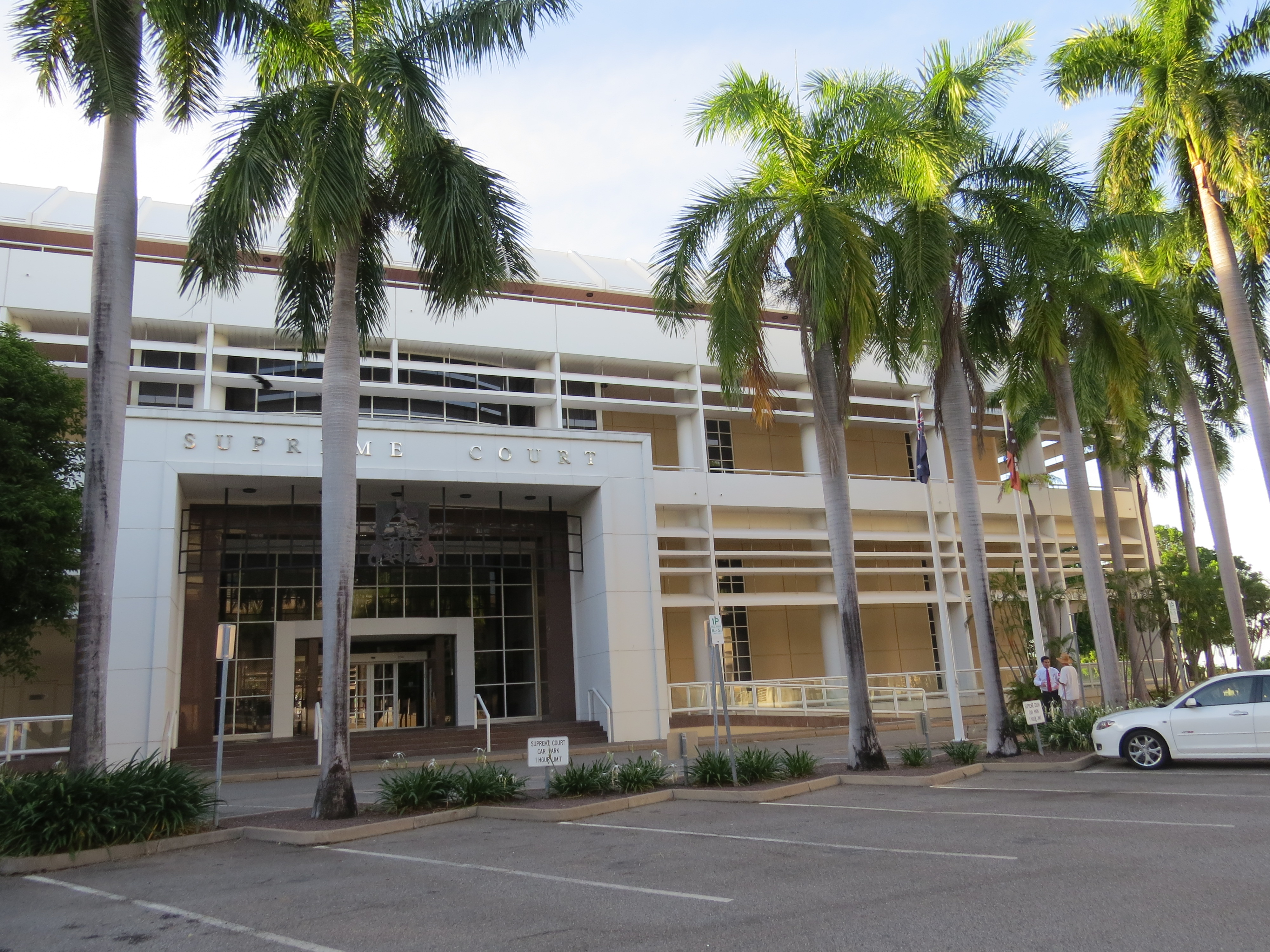 בית המשפט העליון בעיר דרווין